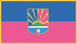 Прапор Станиці Луганської